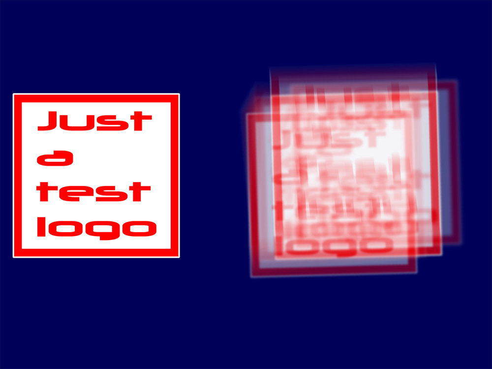 Vergleich des Blicks mit einem gesunden Augen und einem mit einem Keratokonus Stufe 4. Es wird verdeutlicht, wie stark die Sehstärke bei fortgeschrittenem Krankheitsbild abnimmt.